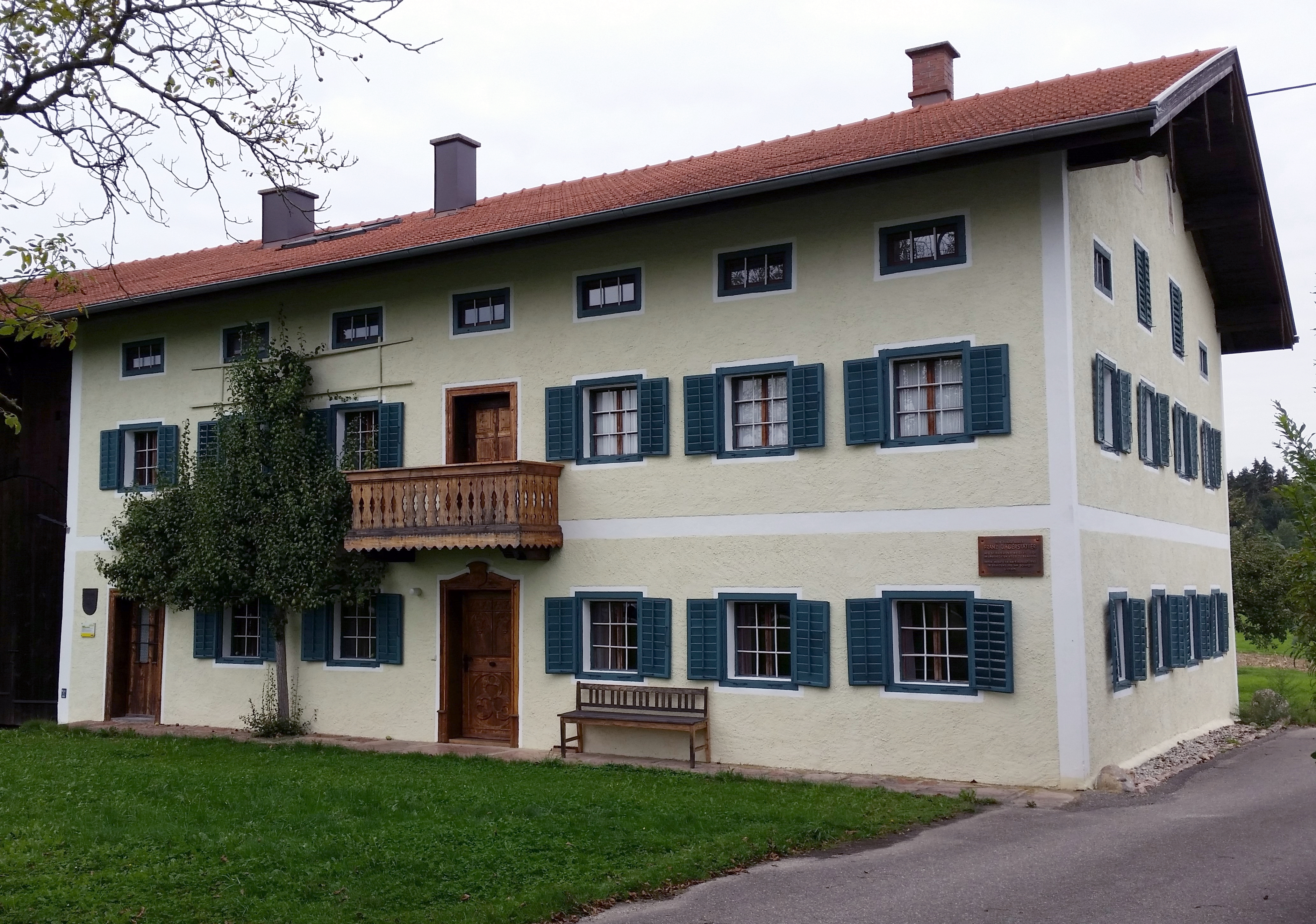 Bauernhaus, Franz Jägerstätter-Museum